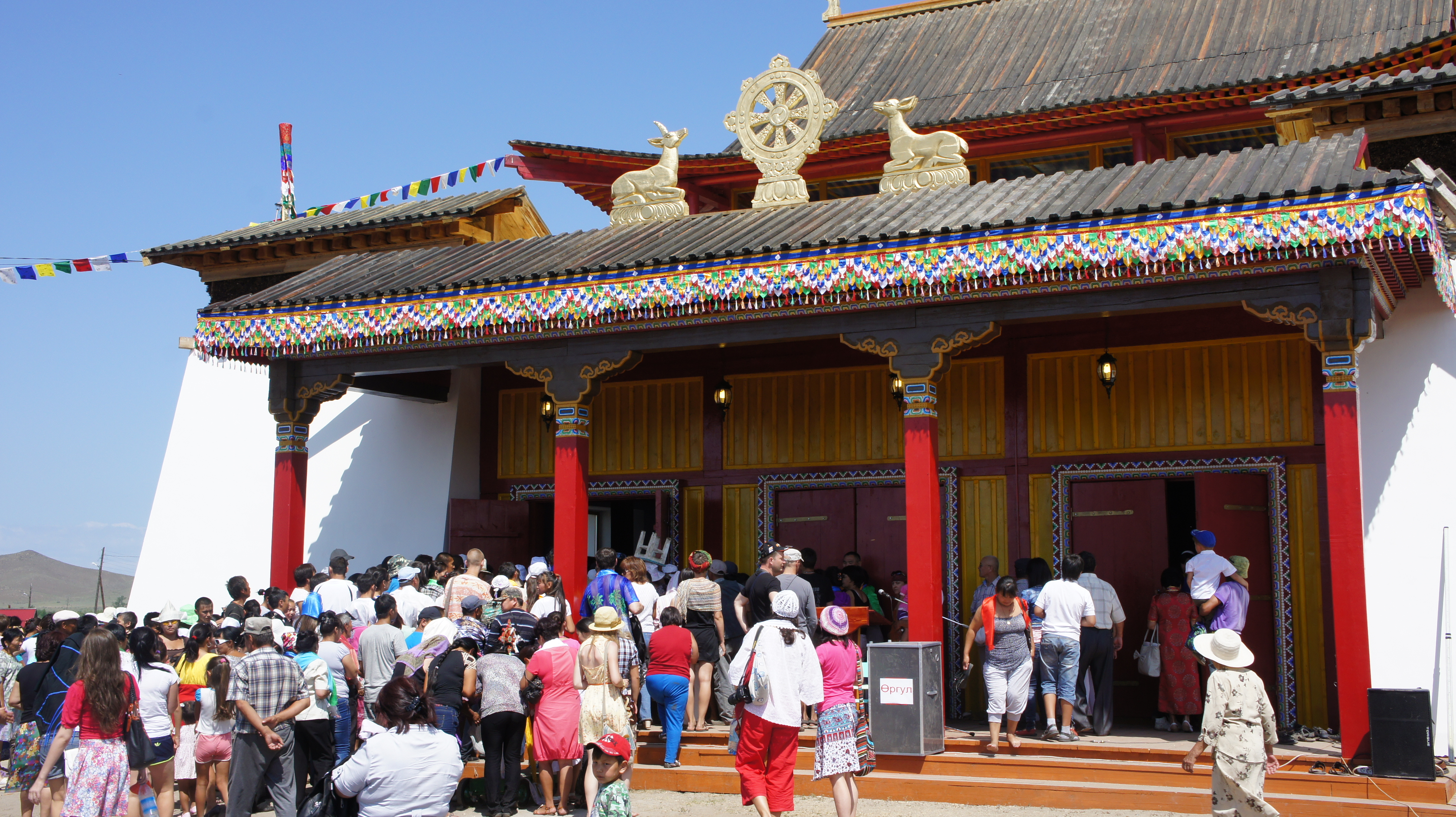 открытие Устуу-Хурээ 2012год